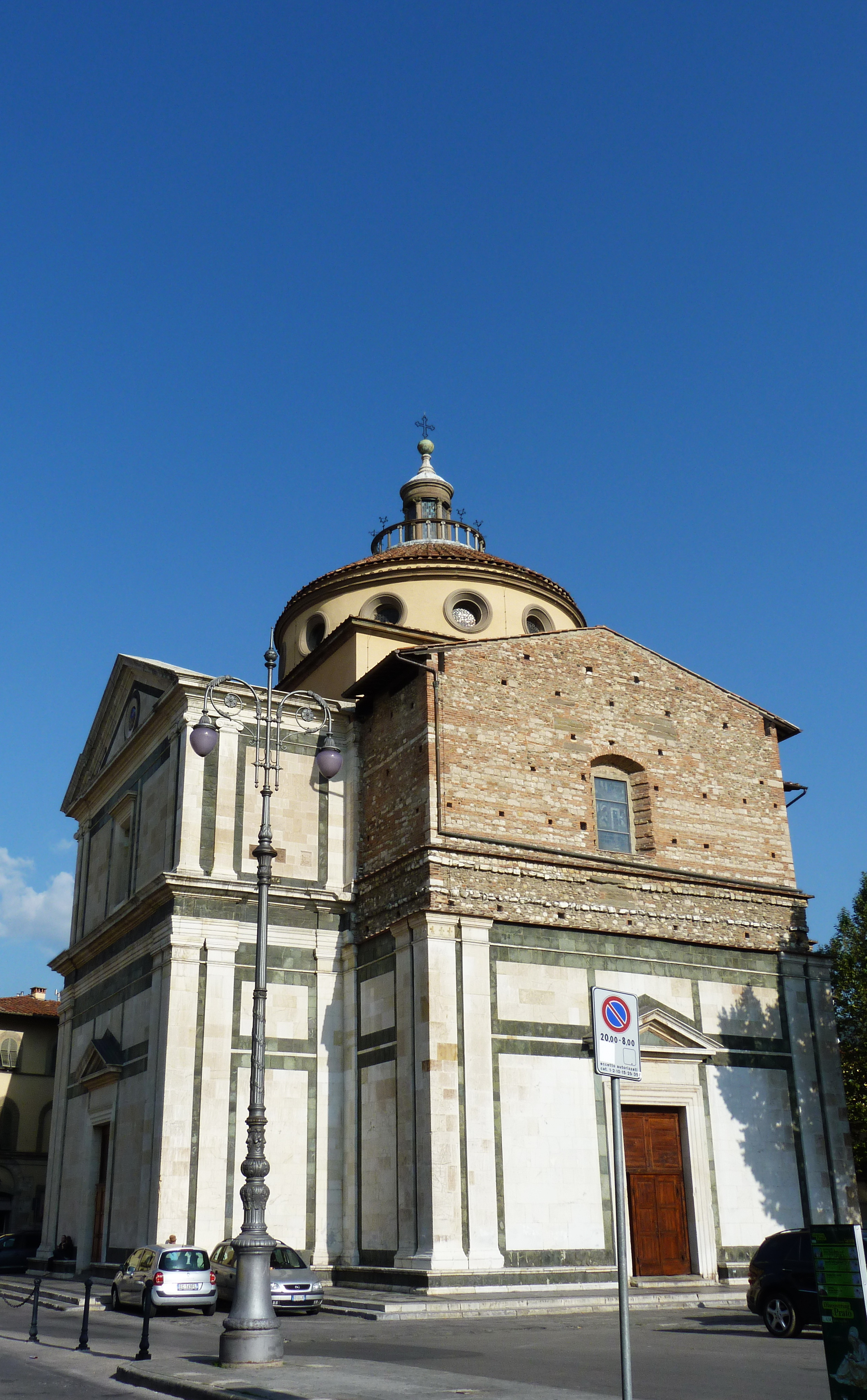 Chiesa di Santa Maria delle Carceri, Piazza delle Carceri, Prato, Toscana, Italia This is a photo of a monument which is part of cultural heritage of Italy.